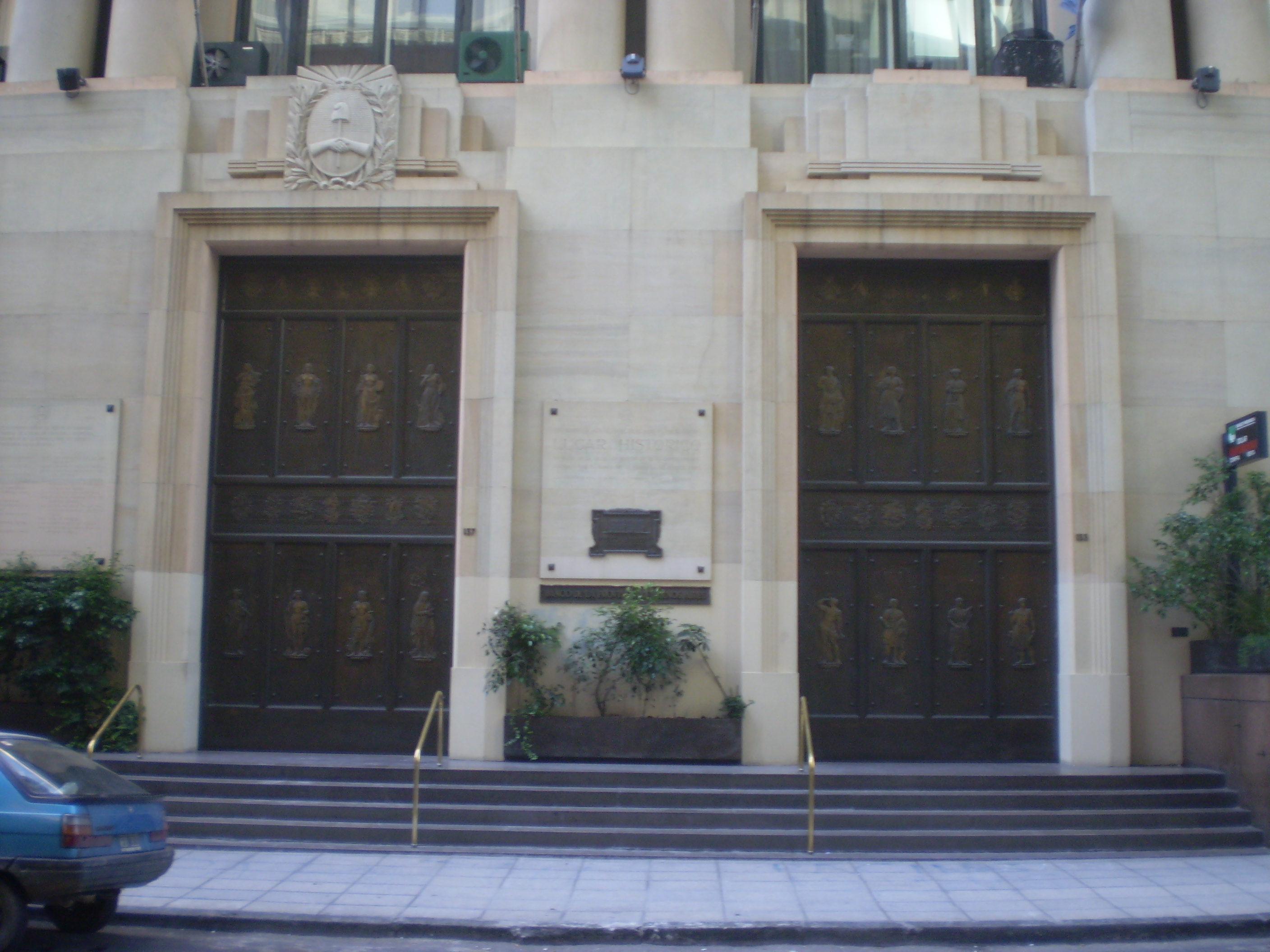 Fachada de la sede del Banco de la provincia de Buenos Aires en la CABA